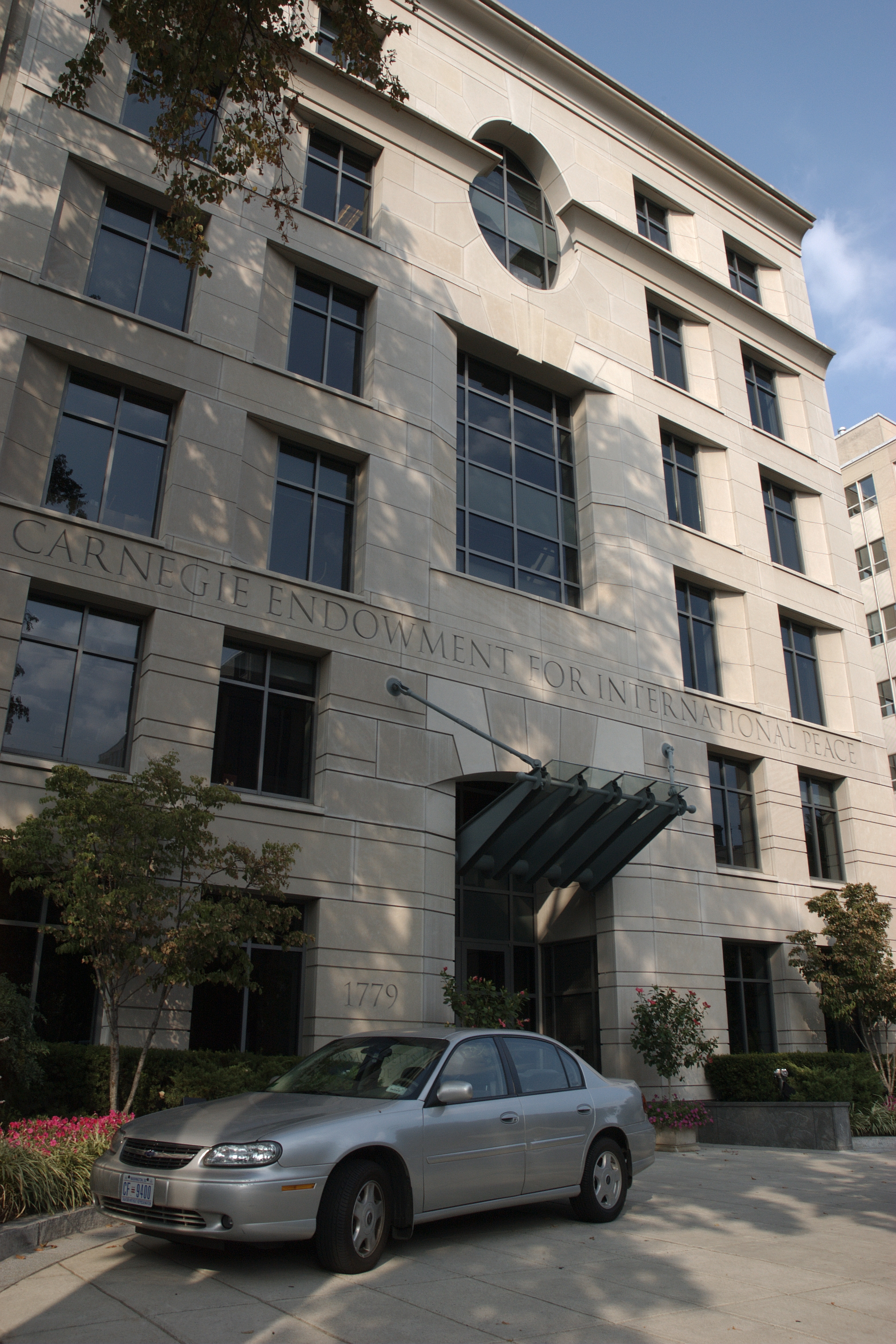 Sede central del Fondo Carnegie